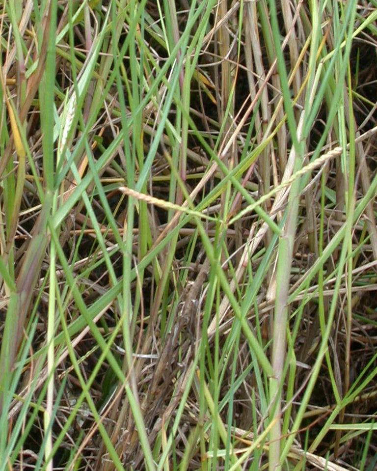 Paspalum vaginatum （Poacea)：サワスズメノヒエ Locarity:Okinawa Island, Japan ：沖縄本島南部 2004.08.12